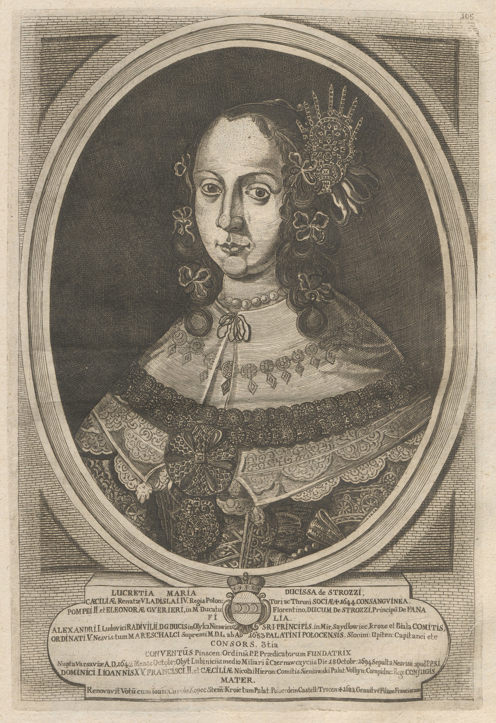 Беларуская (тарашкевіца): Партрэт Люкрэцыі Марыі Радзівіл (Lukrecyja Maryja Radzivił) з роду Строзі